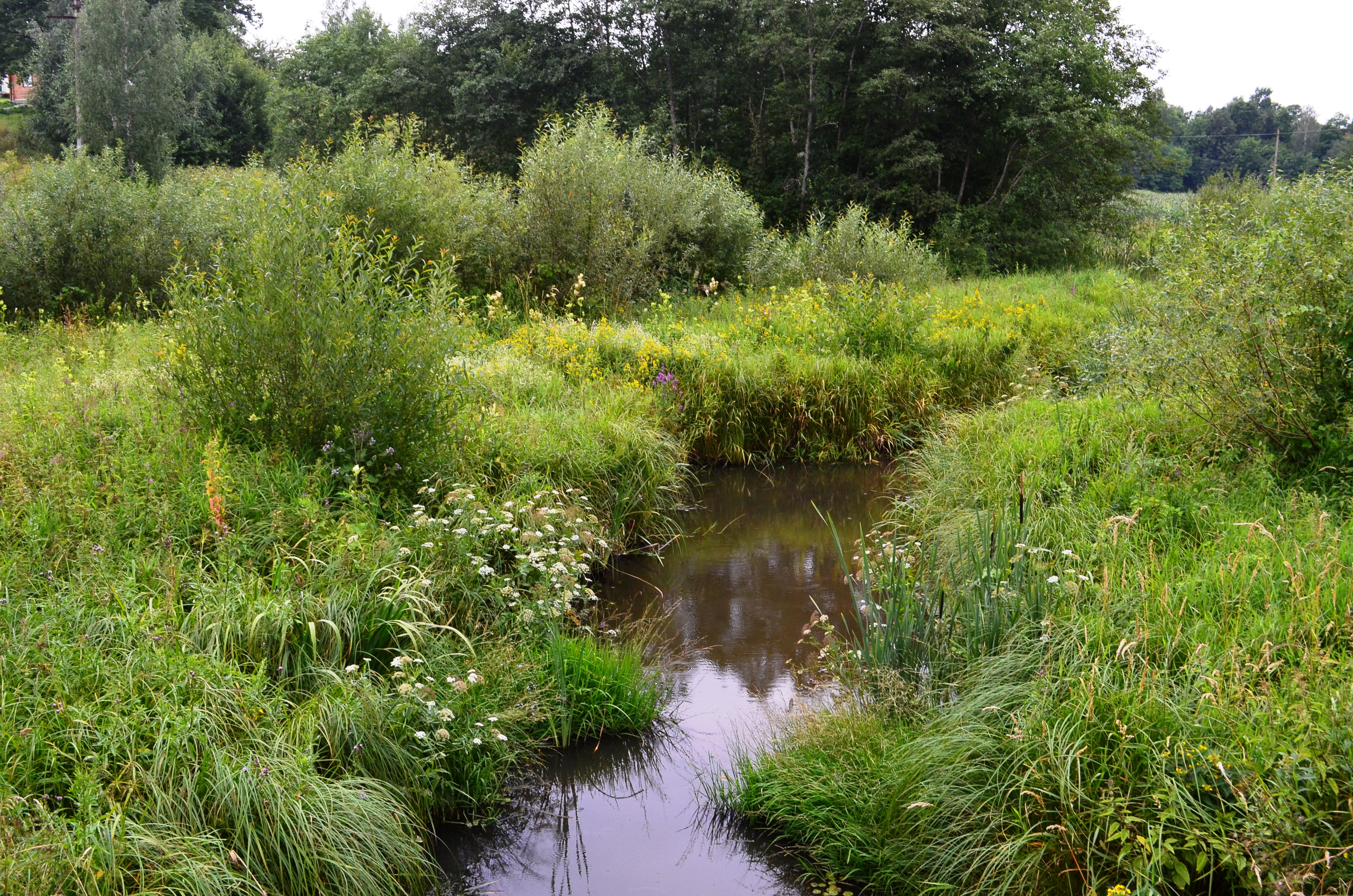 Akmena ties Akmena/Maseliškėmis, Vilniaus r.